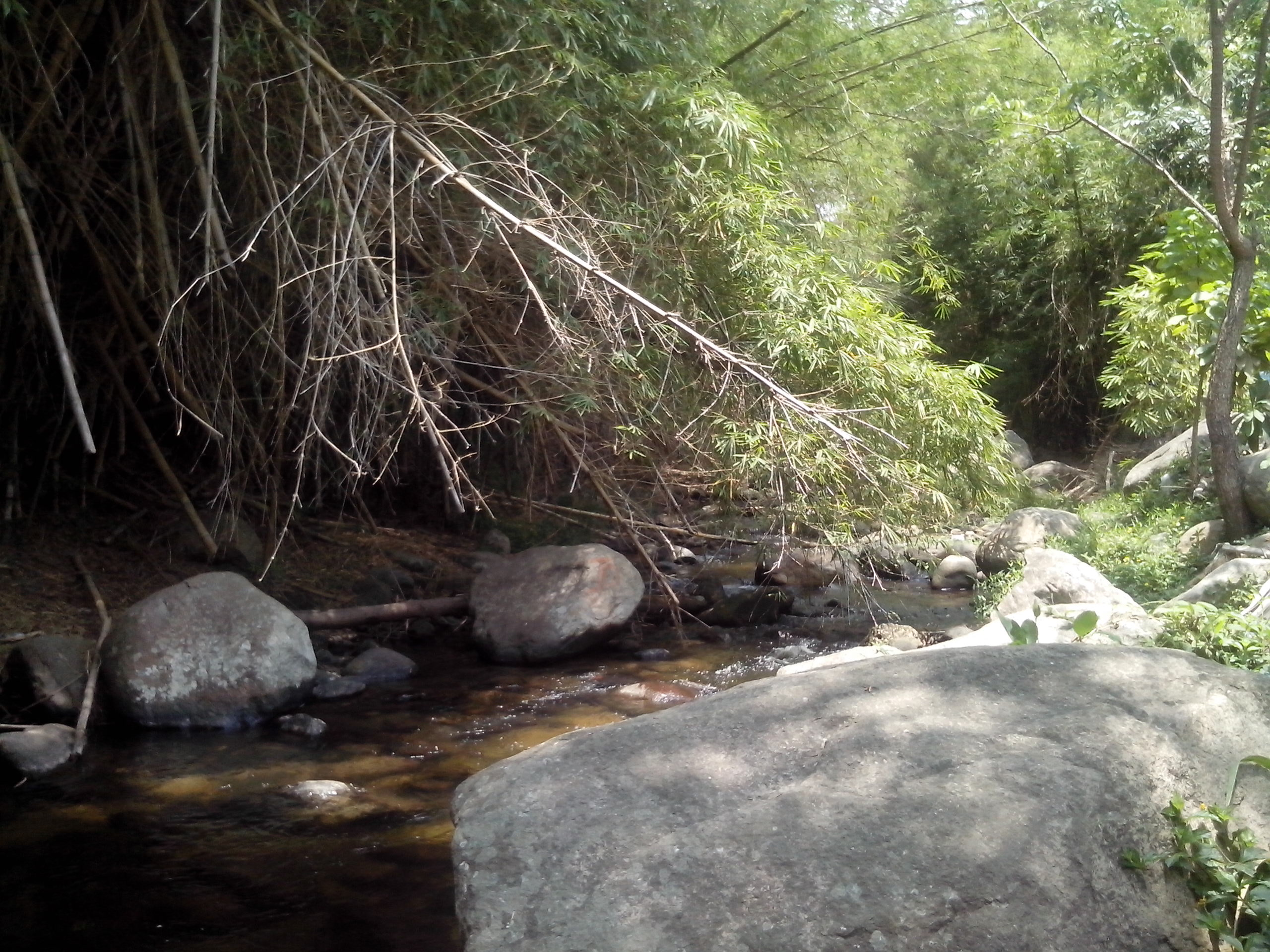 Choroni venezuela